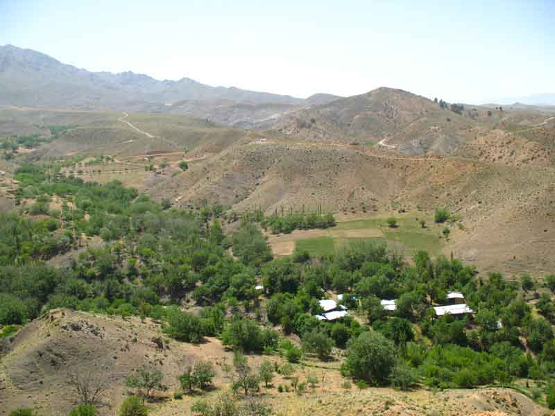 سرمشک